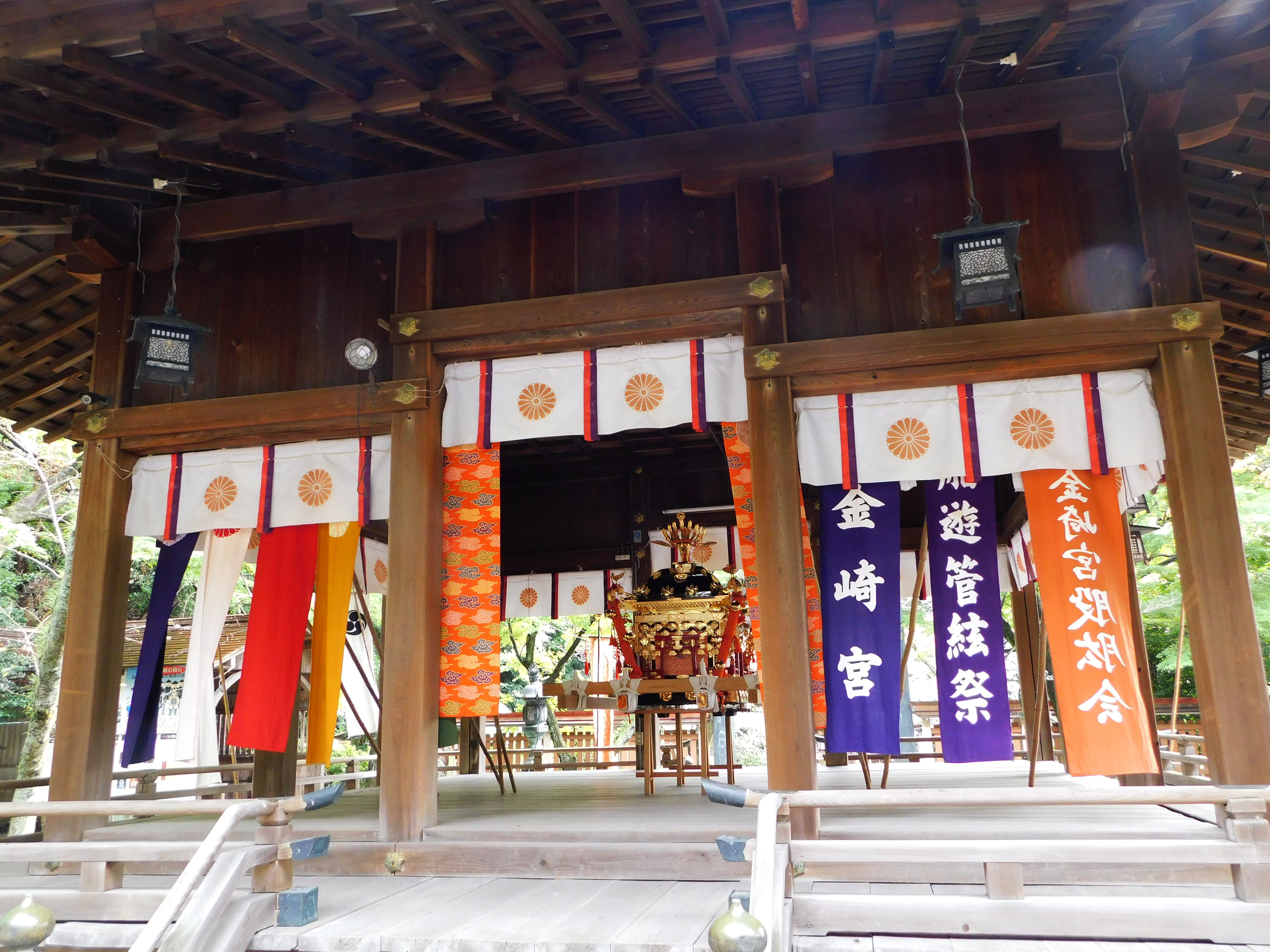 福井県敦賀市金崎宮の神事、御船遊管絃祭、御神体の神輿。